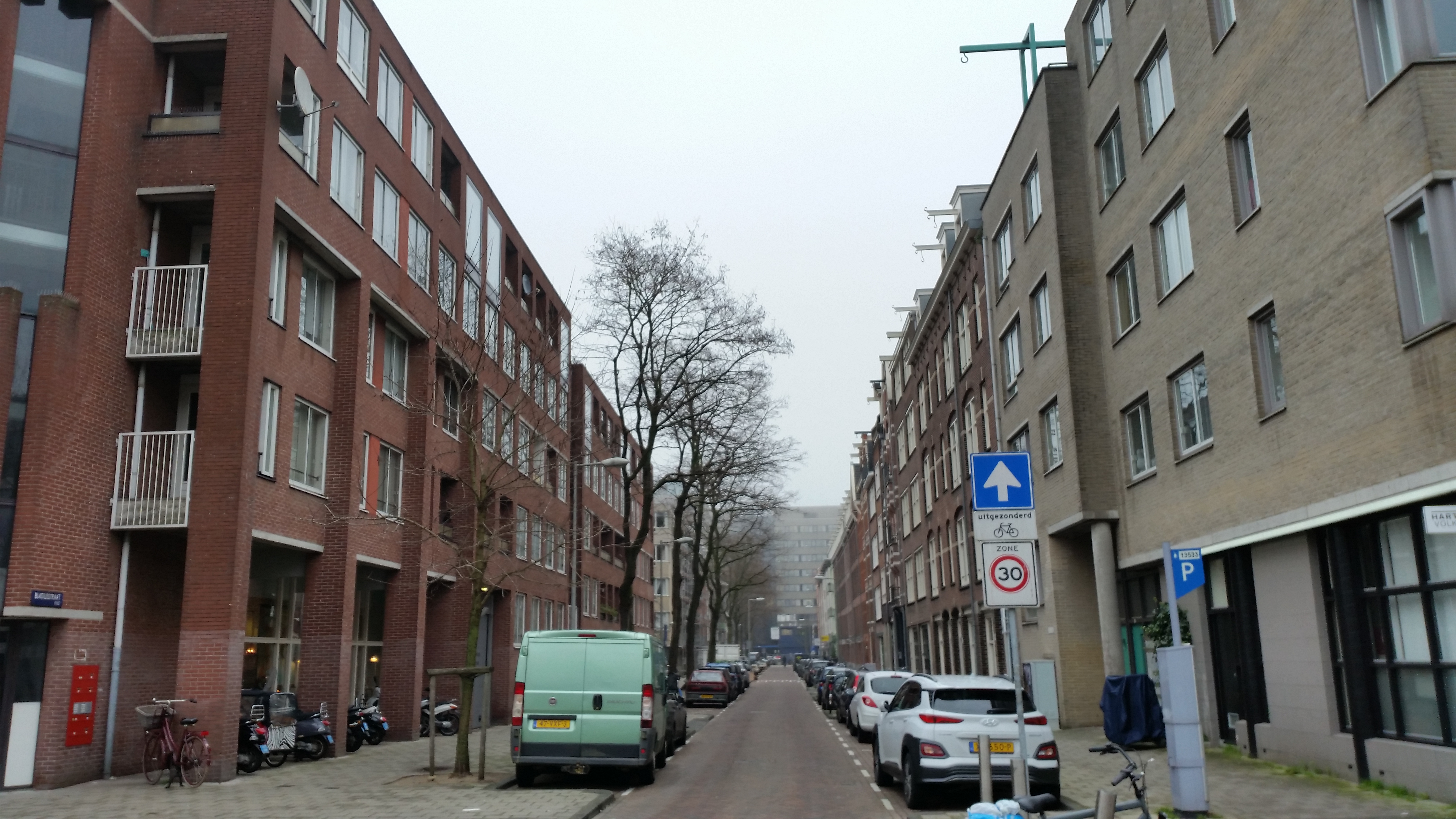 Doorkijk in de Blasiusstraat, Amsterdam, vanaf de Wibautstraat richting OLVG